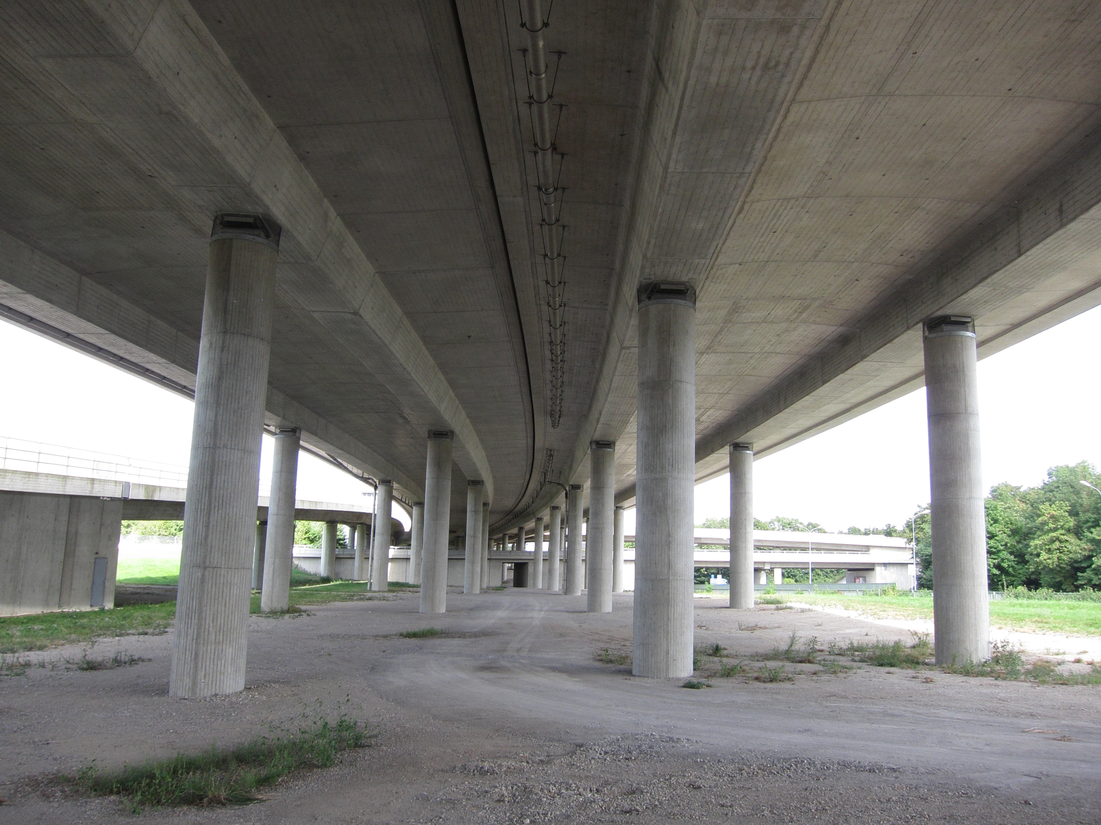 Blick unter die Hochbrücke vom Frankfurter Ring nach Norden